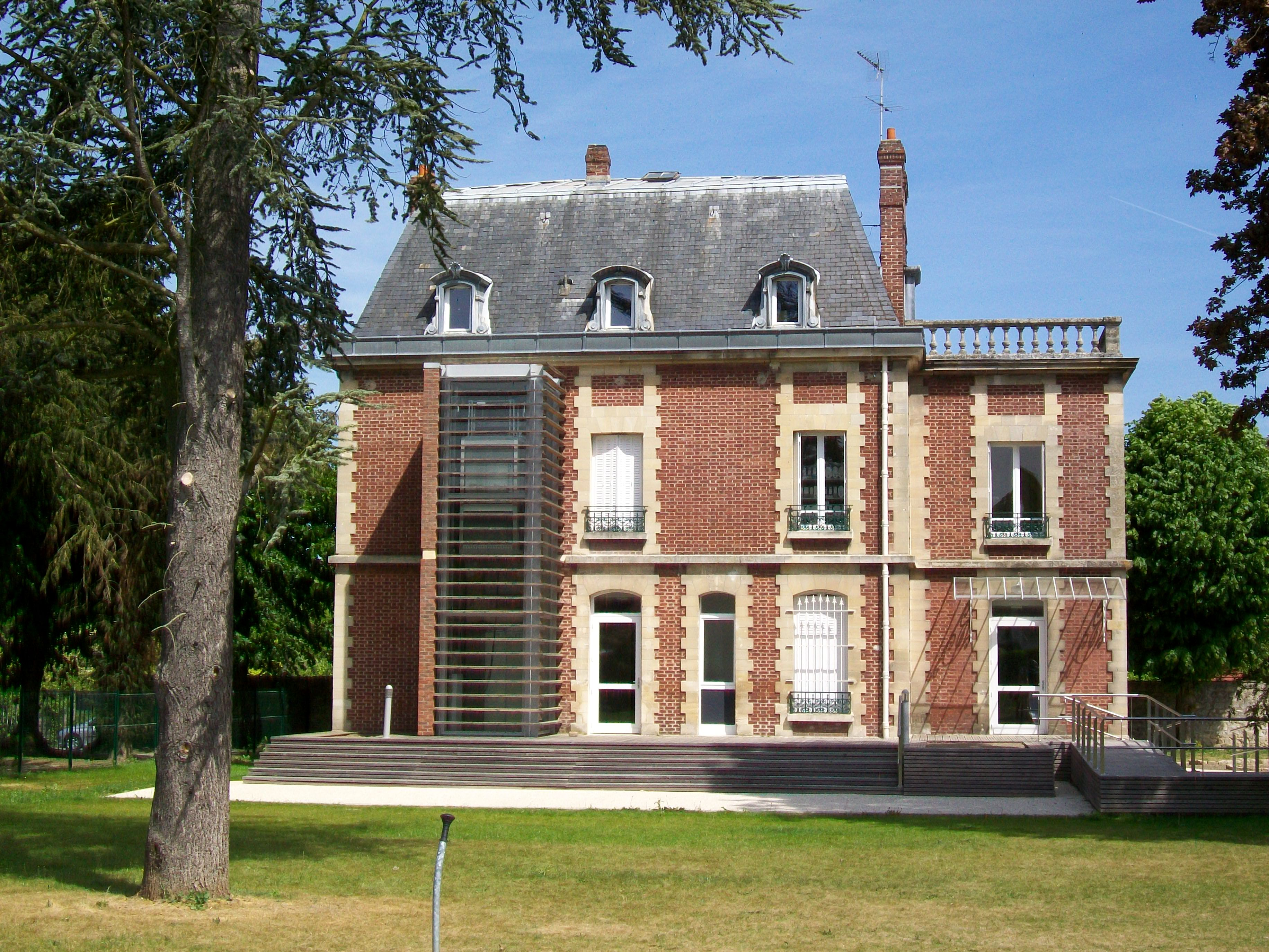 La nouvelle mairie de Thiers-sur-Thève, côté par. Il s'agit de l'ancienne Villa Brica de 1904, construit par l'entrepreneur Magnan de Mortefontaine (Oise), rue du Général Leclerc (près de la place du Château).